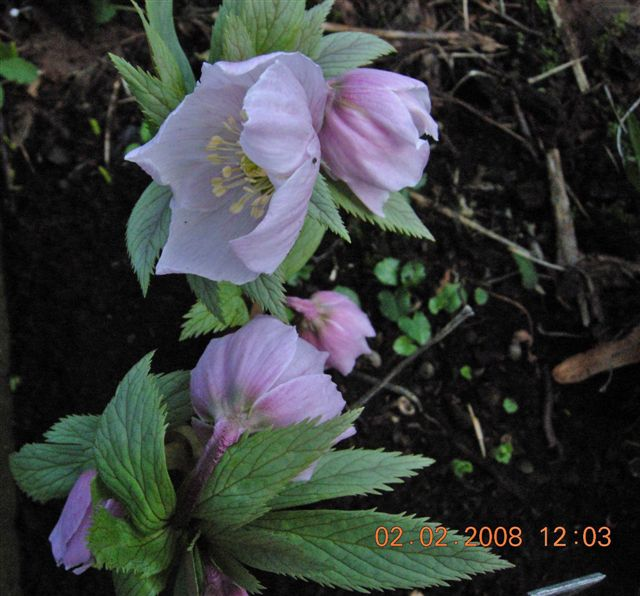 Helleborus thibetanus en culture